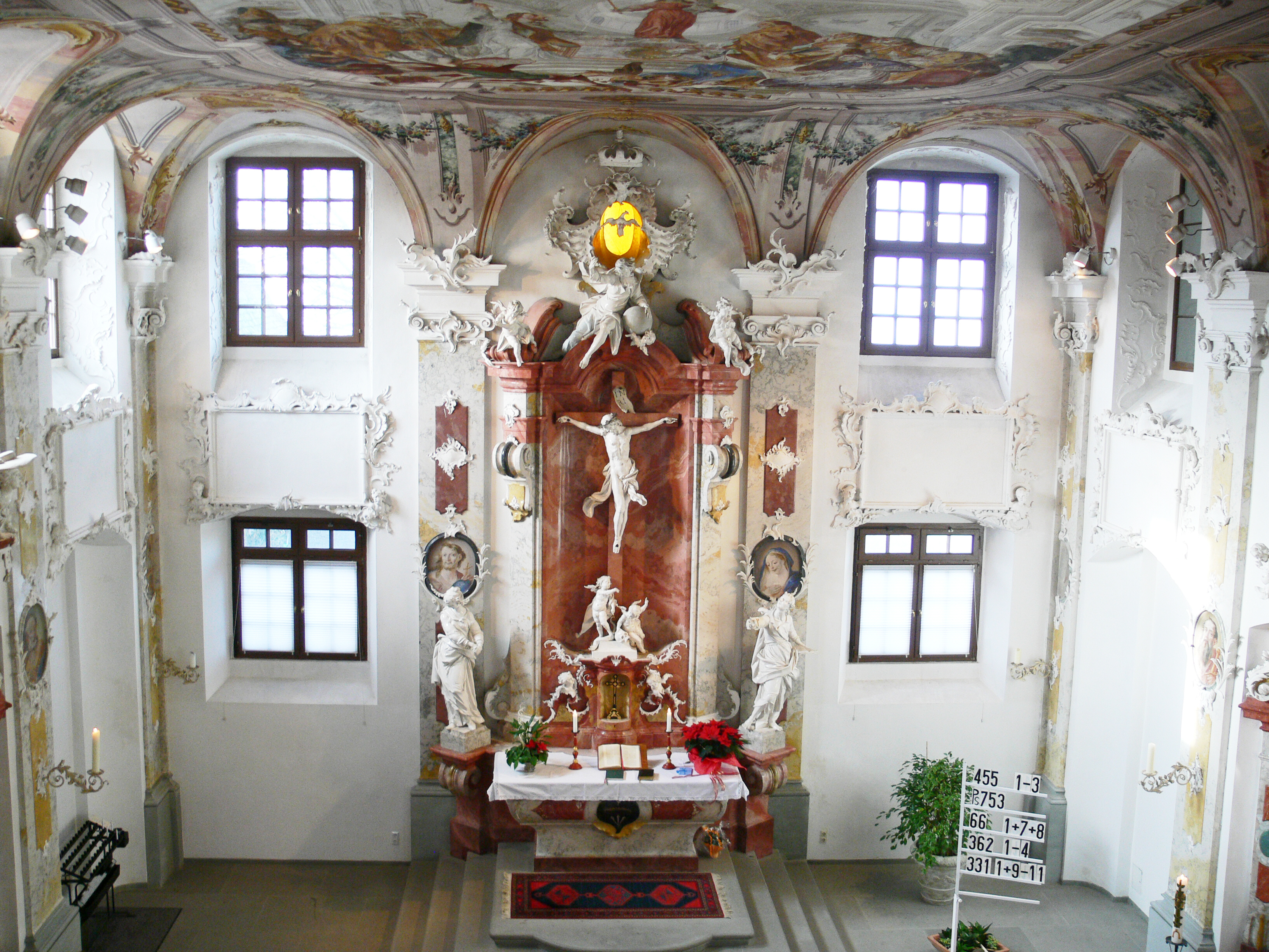 Schlosskirche (heute ev. Pfarrkirche), Neues Schloss Meersburg Altar von Joseph Anton Feuchtmayer, 1741–1743 Joseph Anton Feuchtmayer (1696–1770) Description German sculptor Date of birth/death6 March 16962 January 1770Location of birth/deathLinzMimmenhausen bei Salem (Baden)Work locationOberschwabenAuthority control VIAF: 69721226 LCCN: n84189350 GND: 118532707 ULAN: 500032217 ISNI: 0000 0000 6678 5681 WorldCat WP-Person